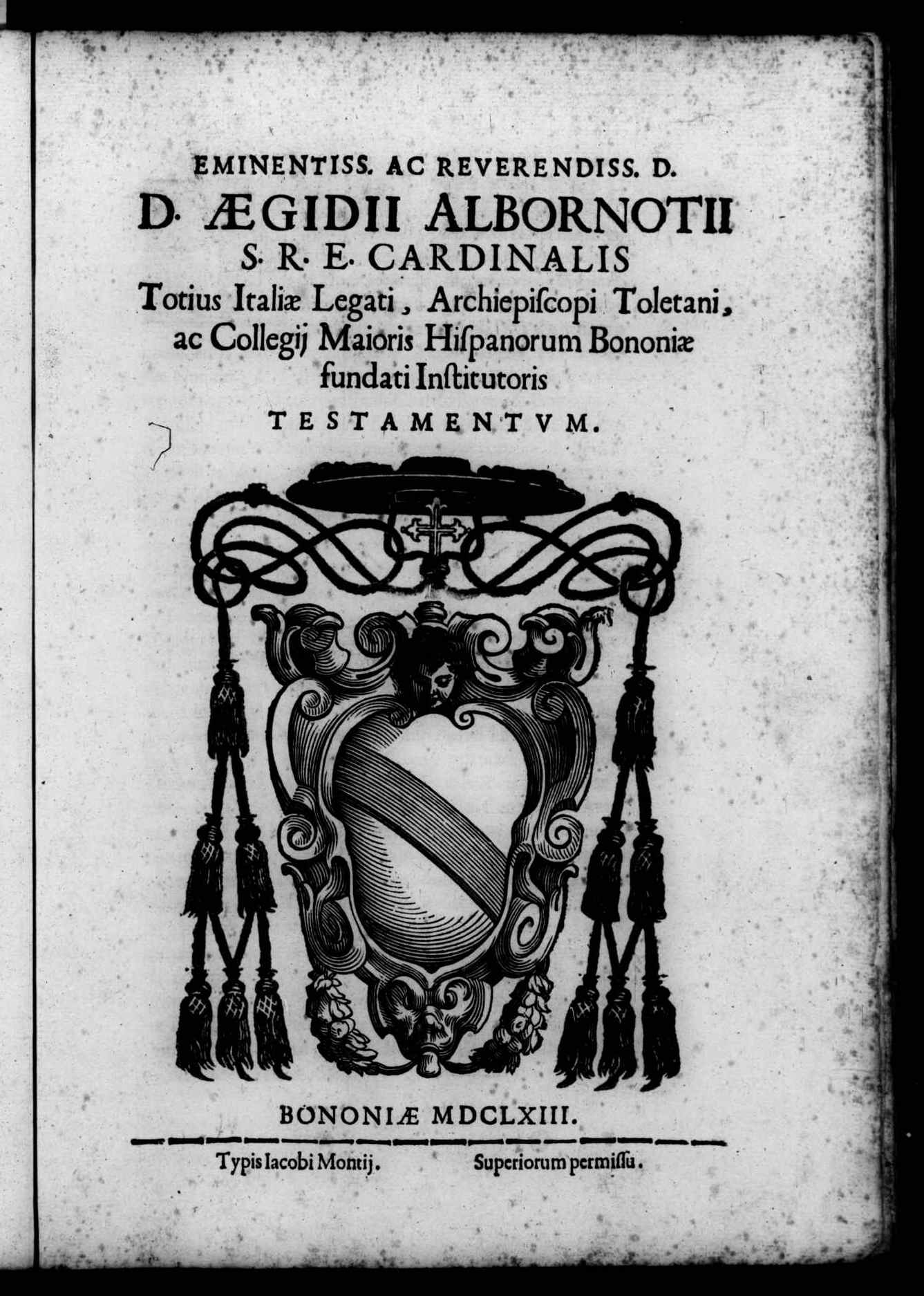 Frontespizio